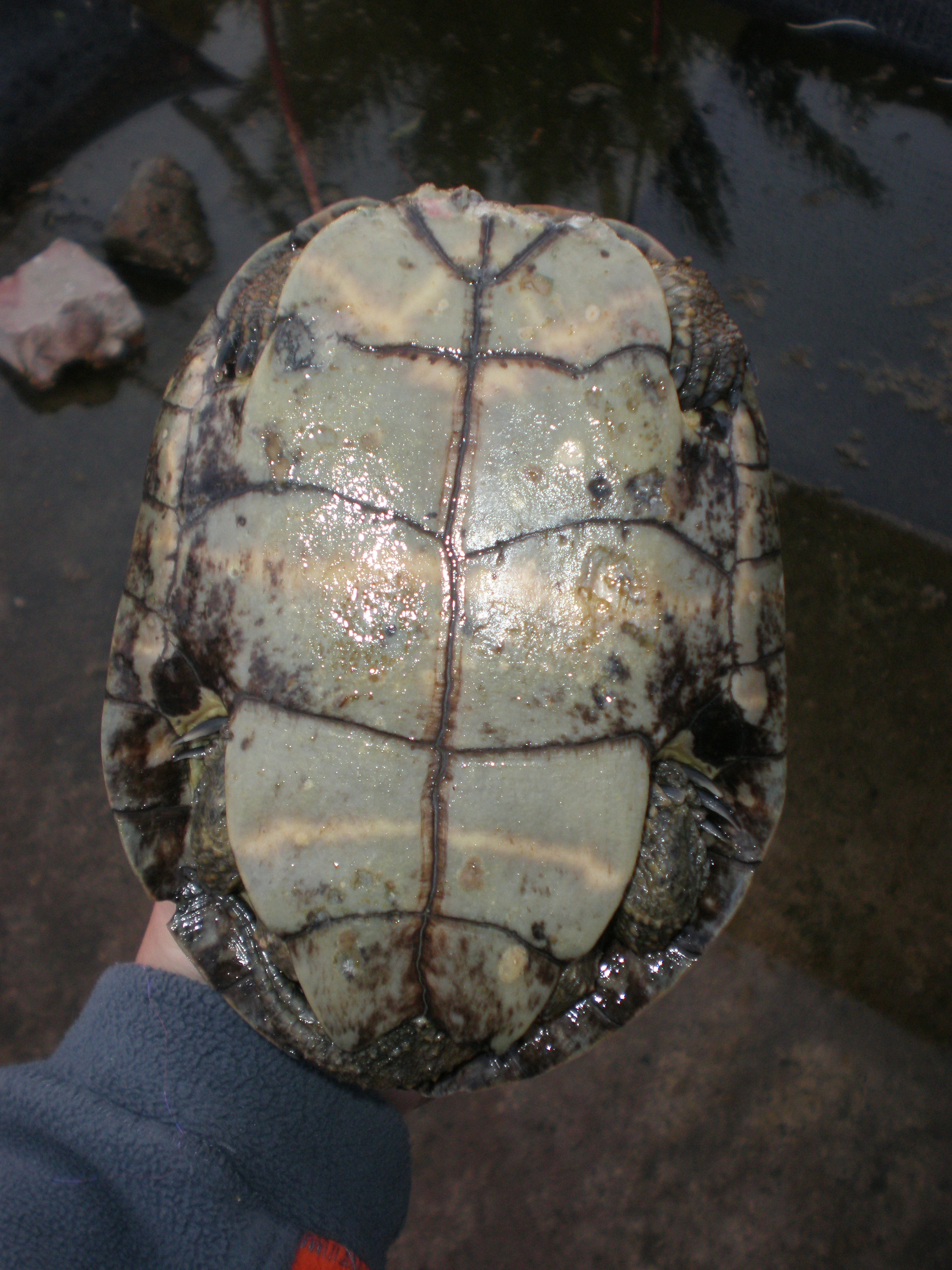 Placas óseas ventrales del Galápago leproso (Mauremys leprosa)